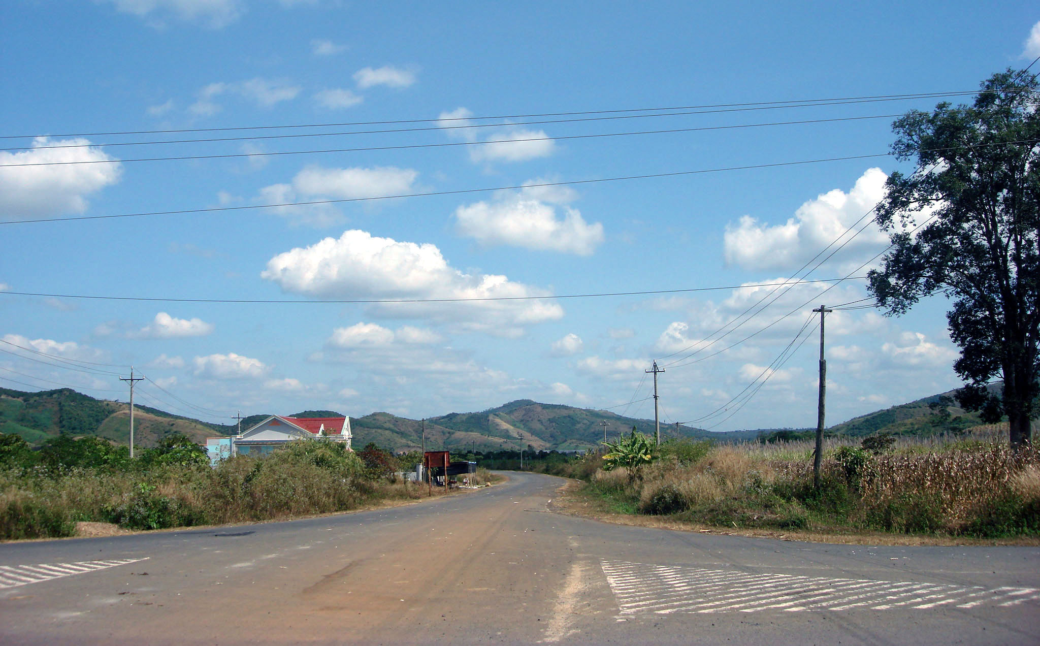 Đường vào buôn Kuôp, xã Dray Sáp, huyện Krông Ana